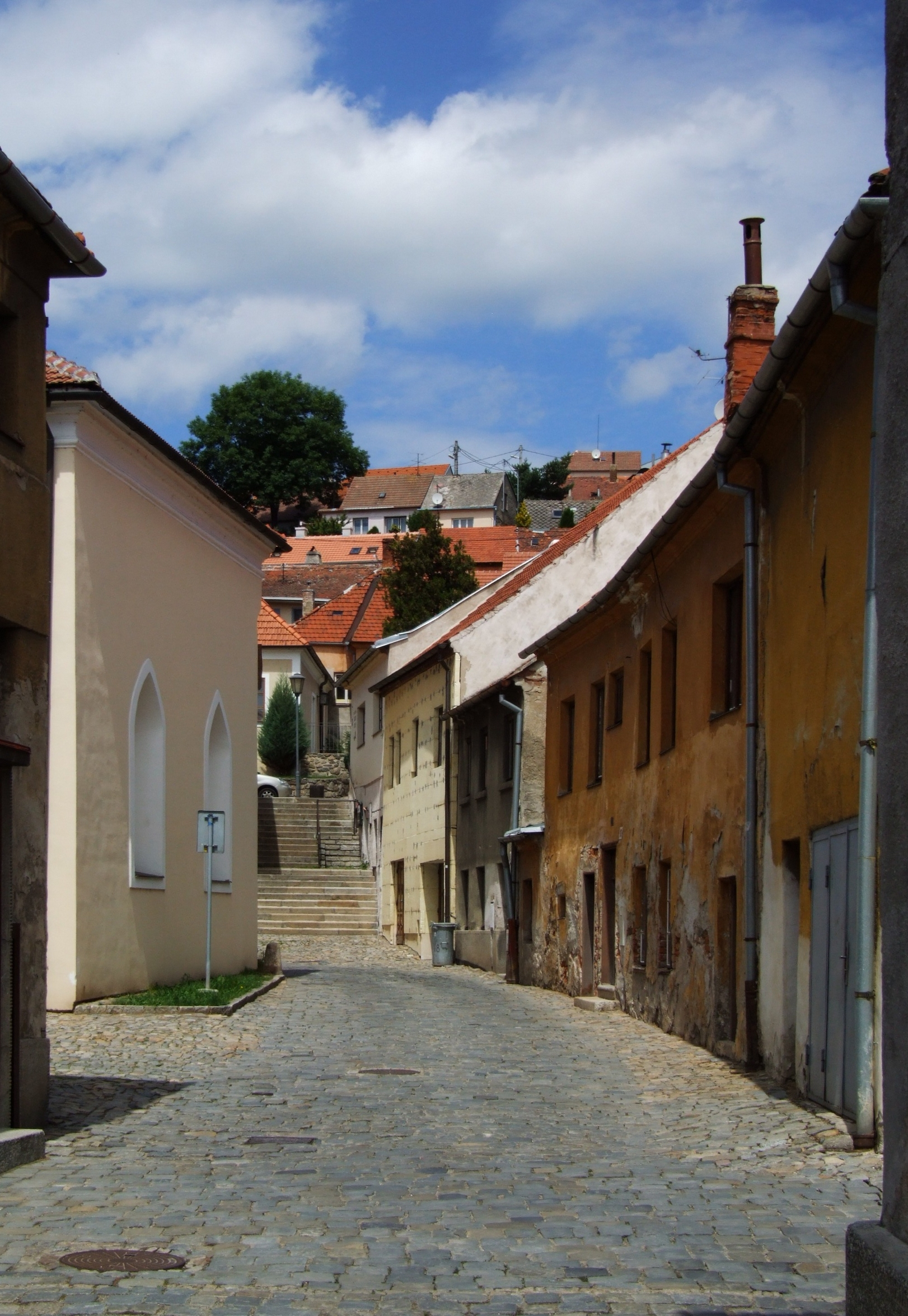 Třebíčská židovská čtvrť - Tiché náměstí